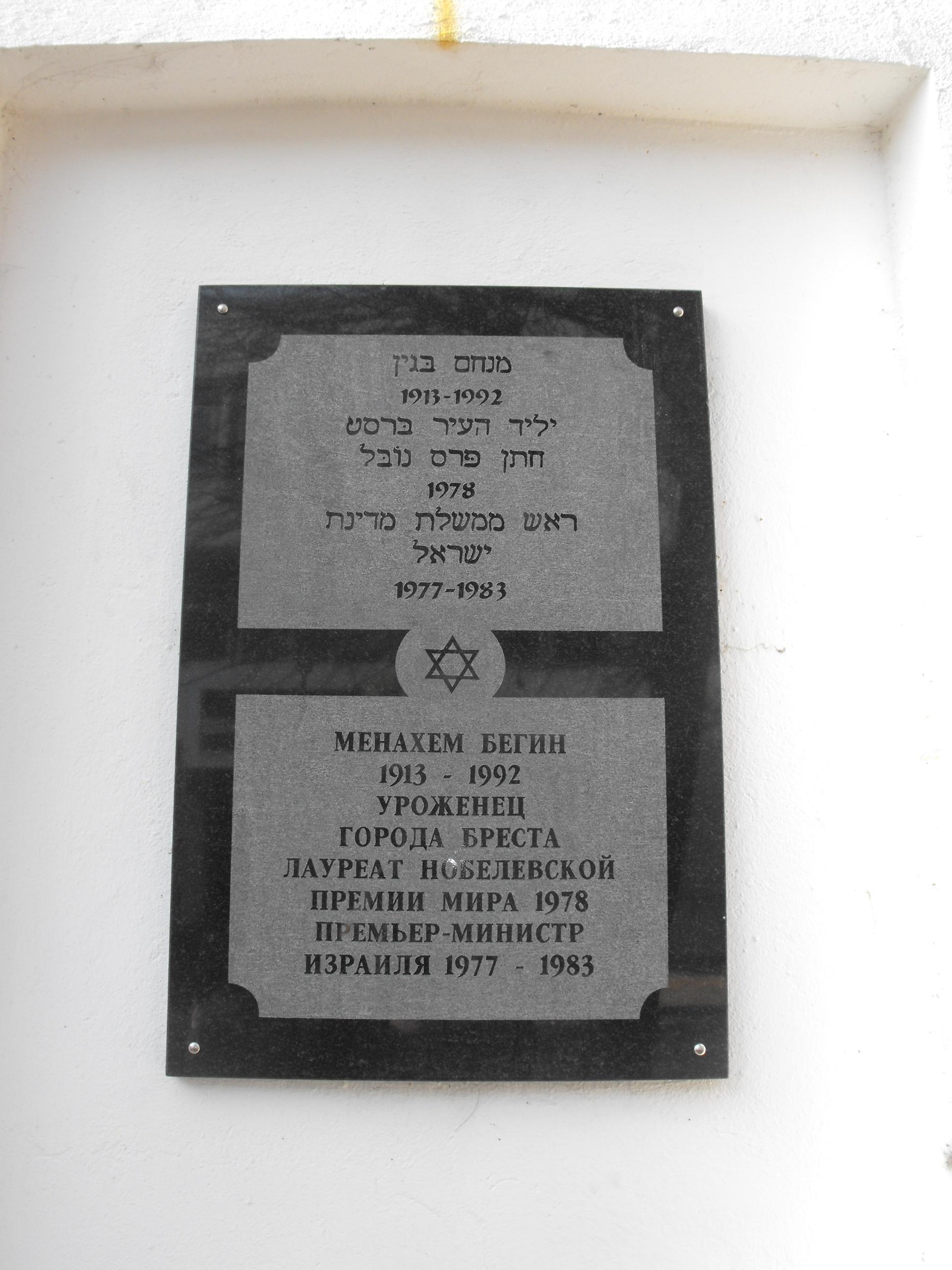 Дом № 49 (здание довоенной иешивы) по ул. Куйбышева, Брест, Беларусь (во время Второй мировой войны - ул. Длинная, на польском ul. Dluga, центр Брестского гетто). Мемориальная доска в память о том, что в этом доме до Второй мировой войны учился в иешиве Менахем Бегин - будущий премьер-министр Государства Израиль.